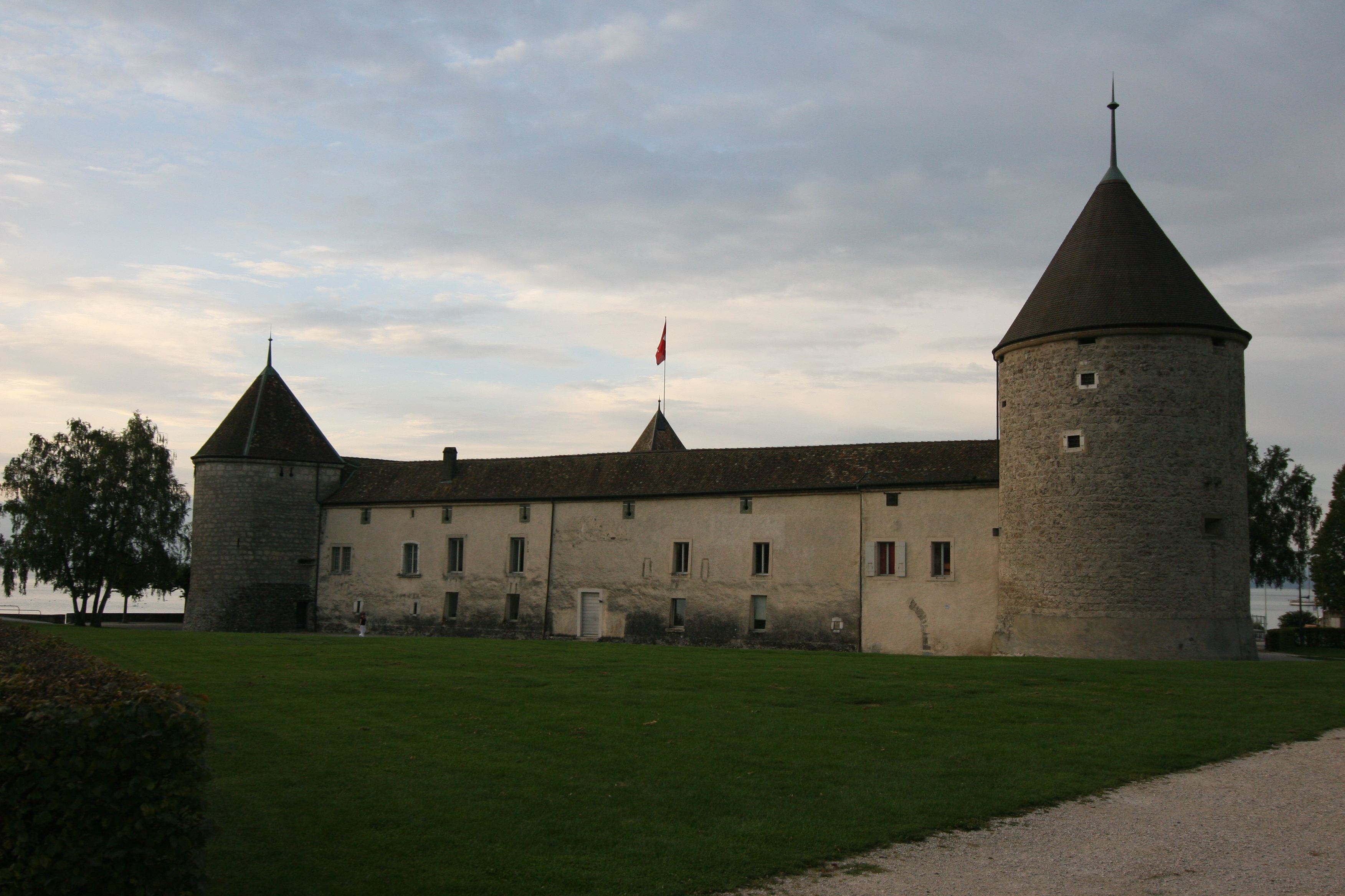 Château de Rolle am Genfer See